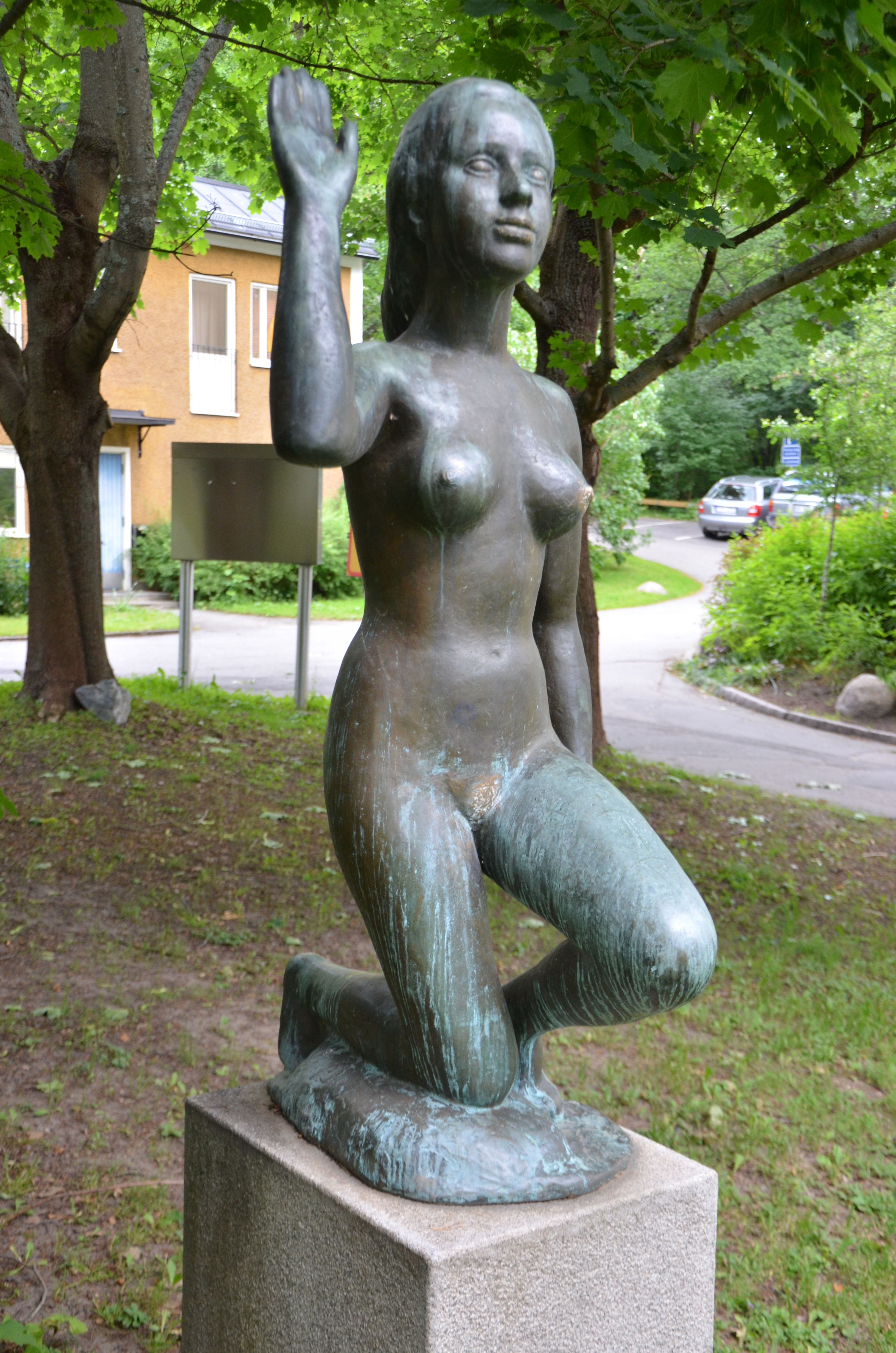 Eva, brons, av Annie Wiberg, parken vid Gröndalsvägen 152 i Stockholm